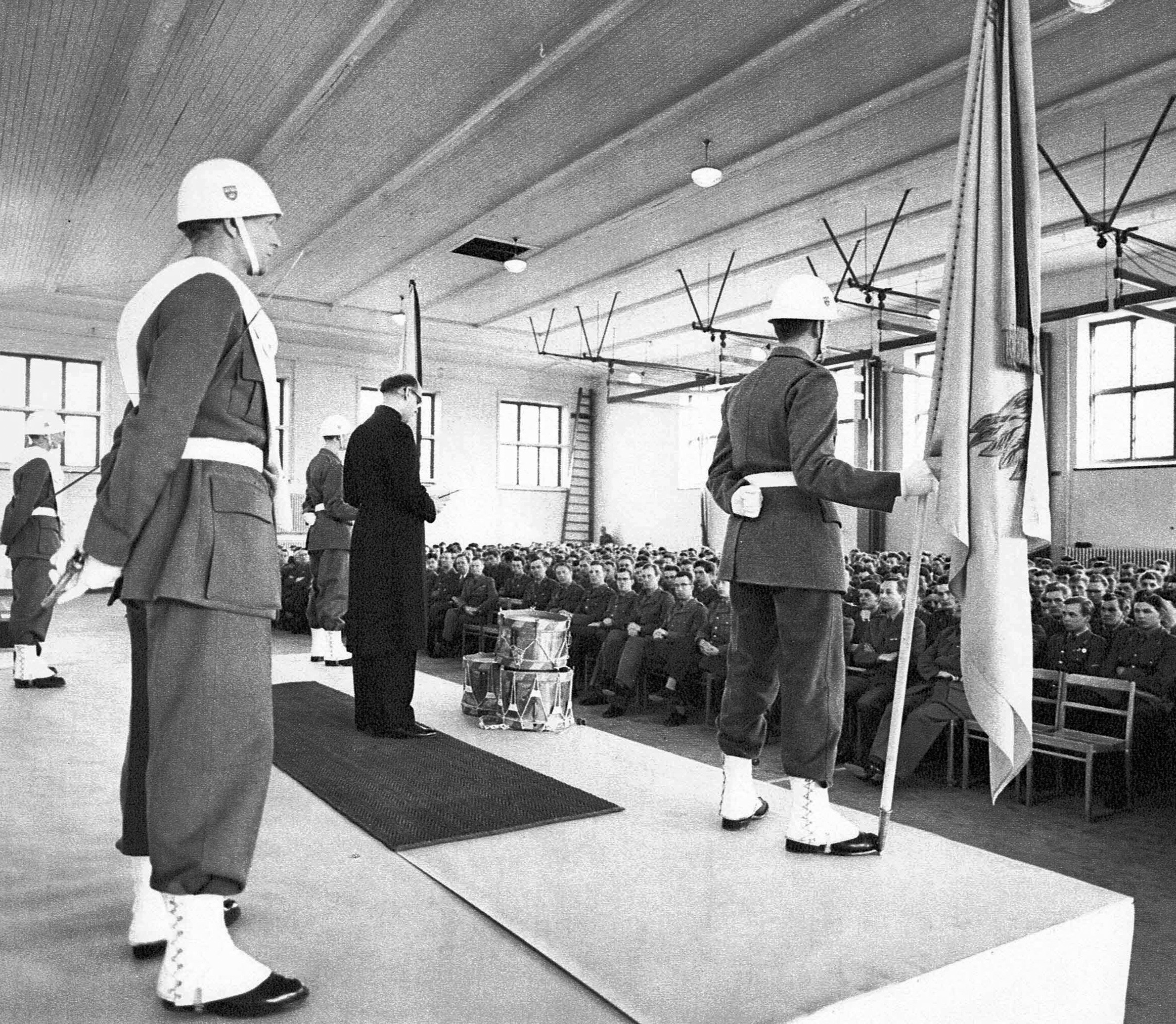 Korum vid Norra Skånska Infanteriregementet (I6)